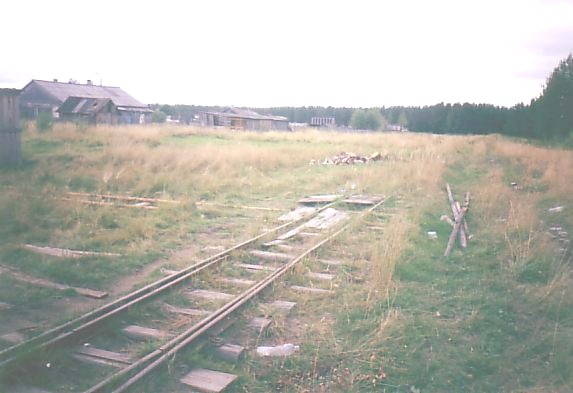 Пути на северной окраине посёлка Донаель. Впереди — тупик.